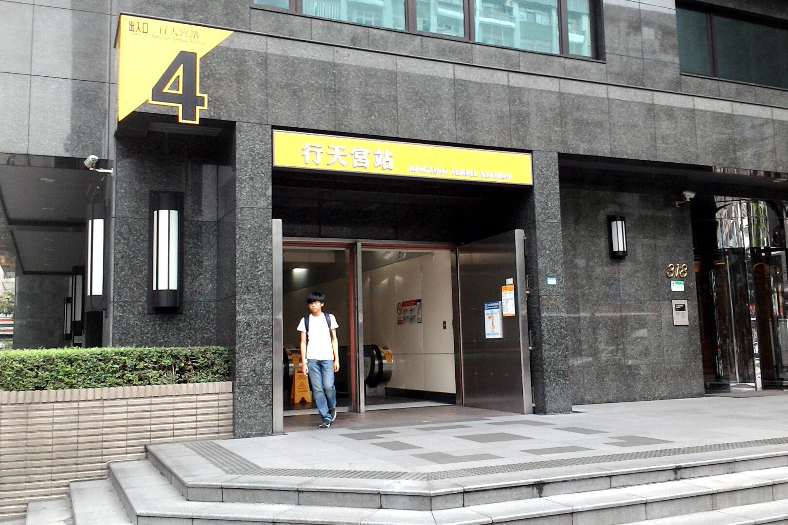 台北捷運行天宮站4號出口,台北市中山區新庄次分區新生里